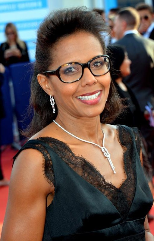 Audrey Pulvar au festival du cinéma américain de Deauville